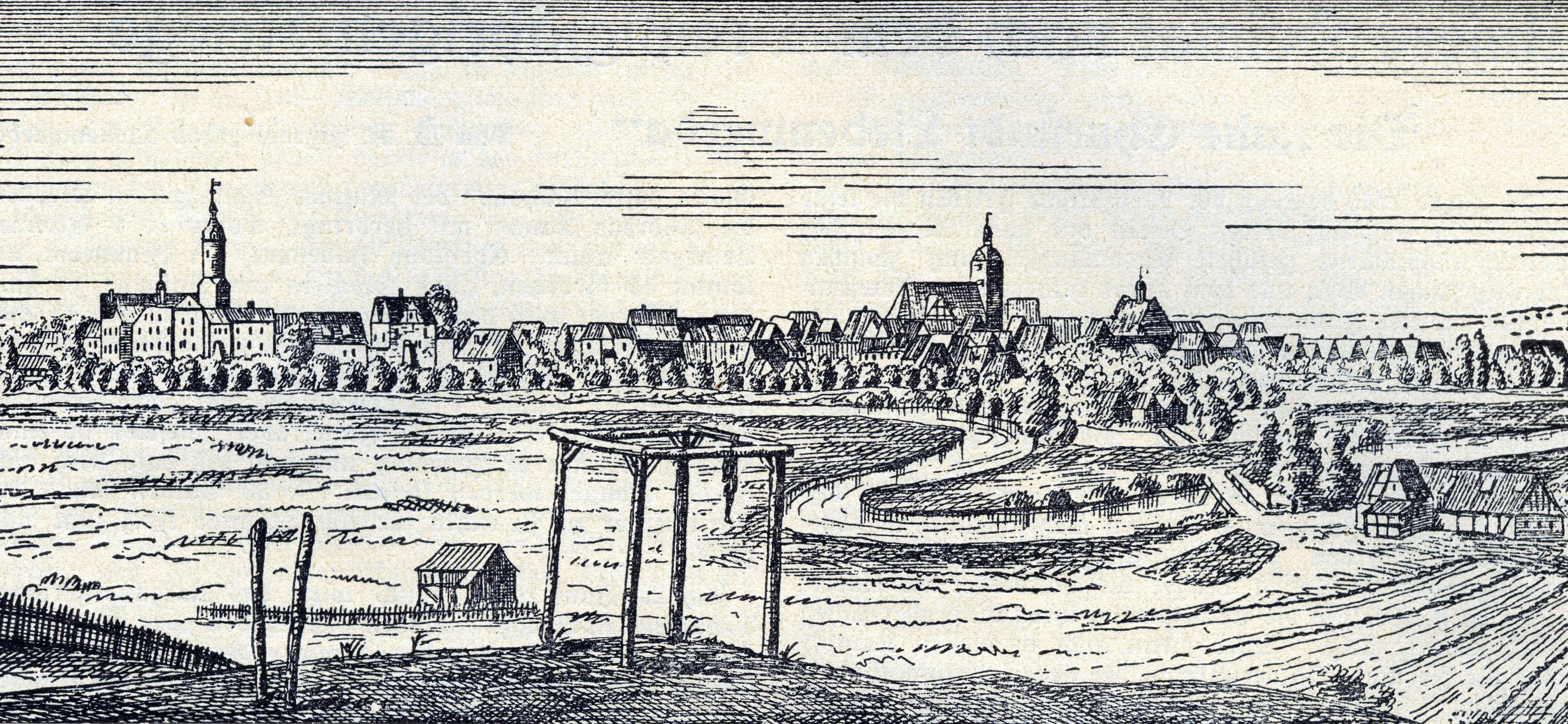 Liebenwerda nach einem Stich vonum 1628